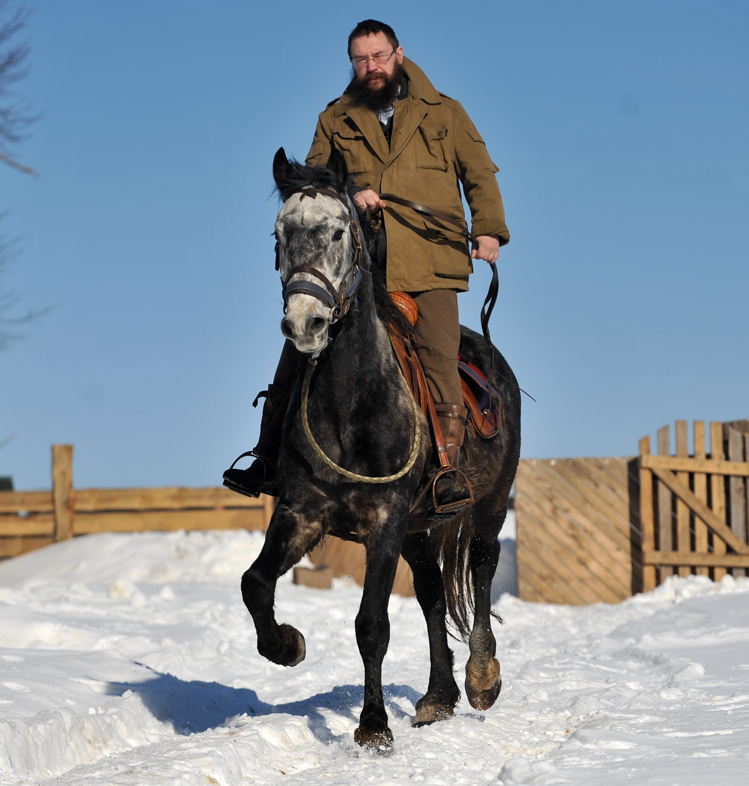 Герман стерлигов на коне